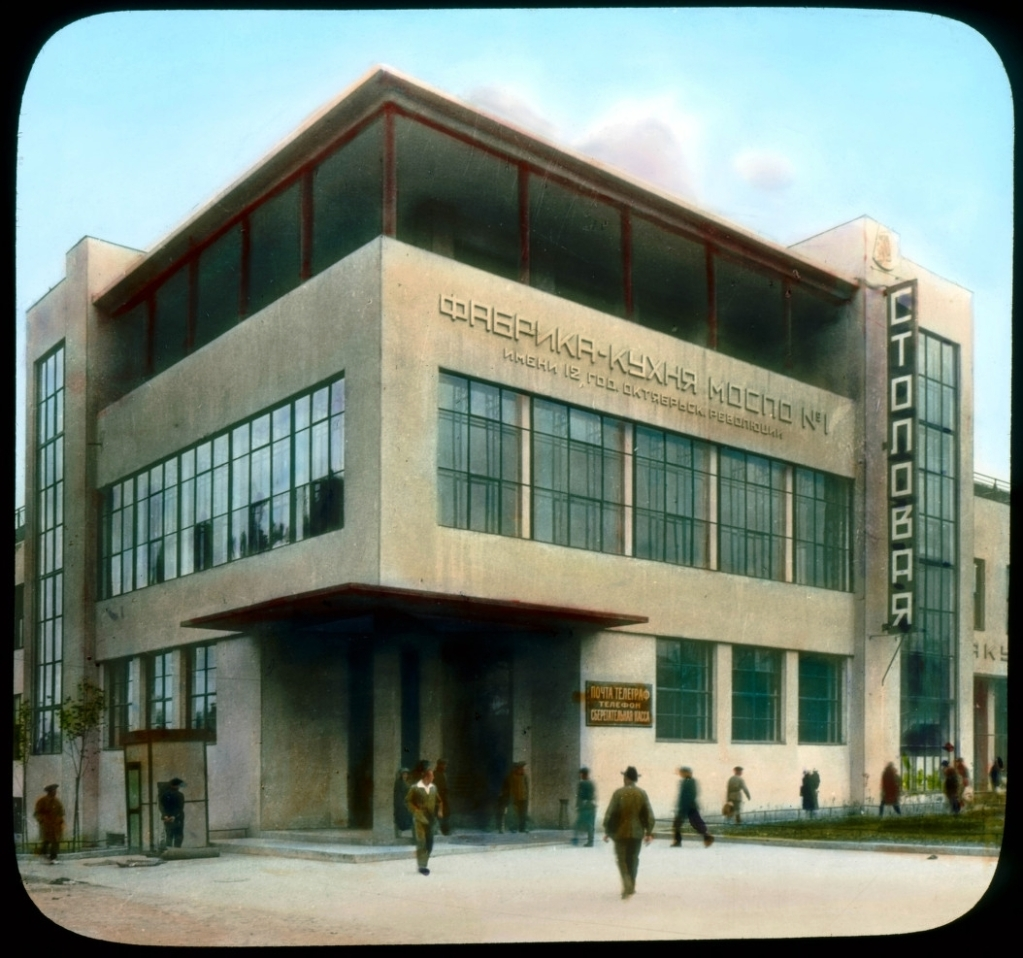 Фабрика-кухня №1, Ленинградский проспект, 7, Москва